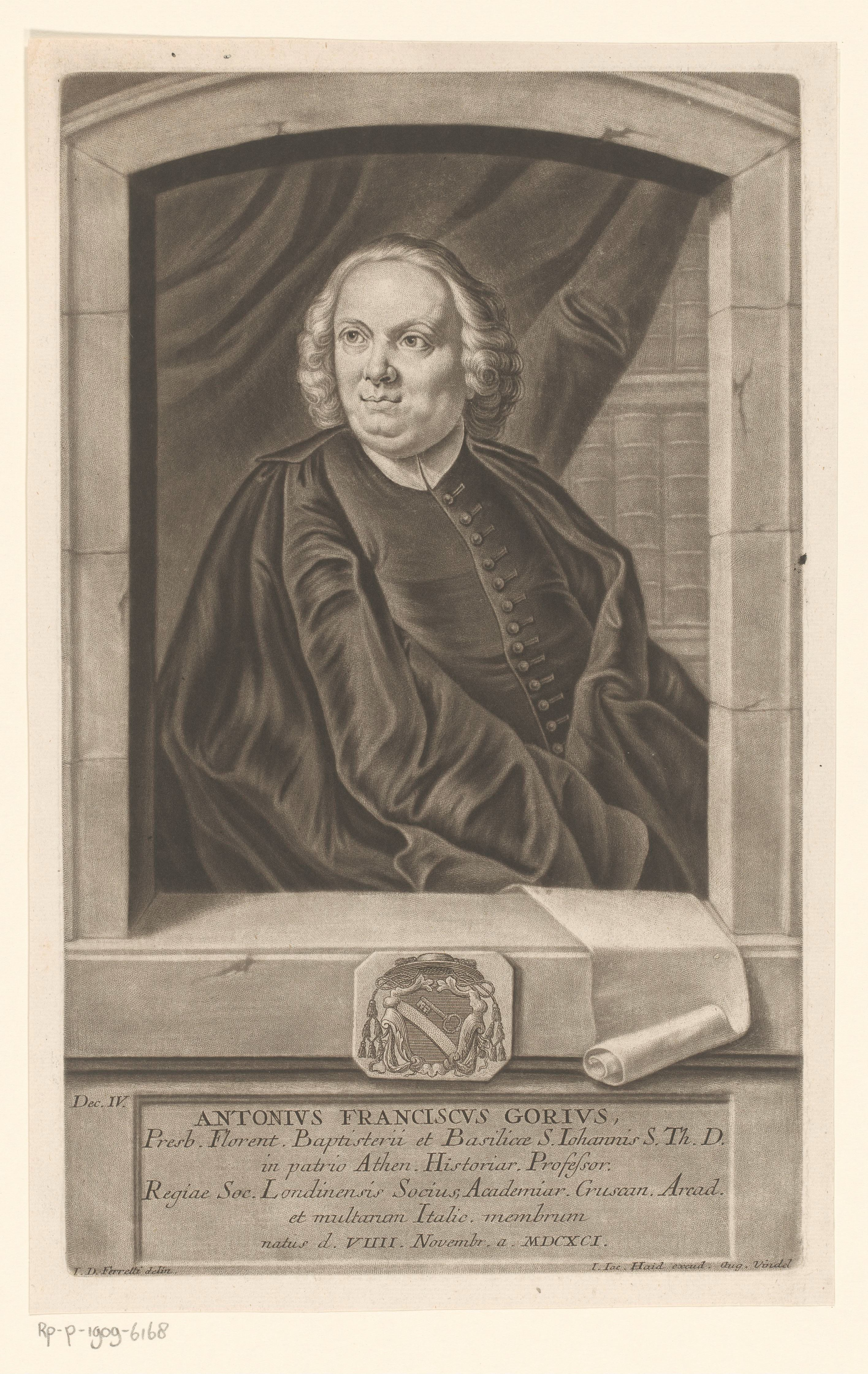 IdentificatieTitel(s): Portret van Antonio Francesco GoriObjecttype: prent Objectnummer: RP-P-1909-6168Catalogusreferentie: HAB A 8018Opschriften / Merken: verzamelaarsmerk, verso, gestempeld: Lugt 2228Omschrijving: Met onderschrift in het Latijn.VervaardigingVervaardiger: prentmaker: Johann Jacob Haid (mogelijk)naar tekening van: Giovanni Domenico Ferretti (vermeld op object)uitgever: Johann Jacob Haid (vermeld op object)Plaats vervaardiging: AugsburgDatering: 1745Materiaal: papier Techniek: mezzotint / etsenAfmetingen: plaatrand: h 311 mm × b 191 mmToelichtingPrent gebruikt voor: Brucker, Jacob. Bildersal heutiges Tages lebender und durch Gelahrheit berühmter Schrifftsteller. Augsburg: Johann Jacob Haid, 1745.OnderwerpWat: historical personsarmorial bearing, heraldrybookshelvesWie: Antonio Francesco GoriVerwerving en rechtenVerwerving: aankoop 1905Copyright: Publiek domein